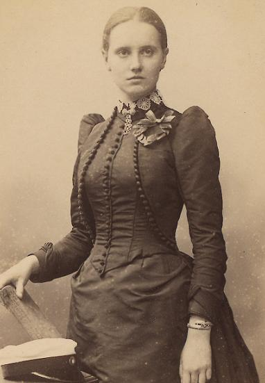 Anna Forsell (gift Söderblom, 1870-1955) med studentmössa vid sin studentexamen 1890.